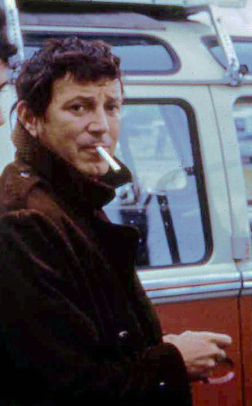 Le chanteur de rock américain Gene Vincent à Cherbourg (Normandie, France).Unknown american rock singer gene vincent in cherbourg (normandie, france) in 1967.